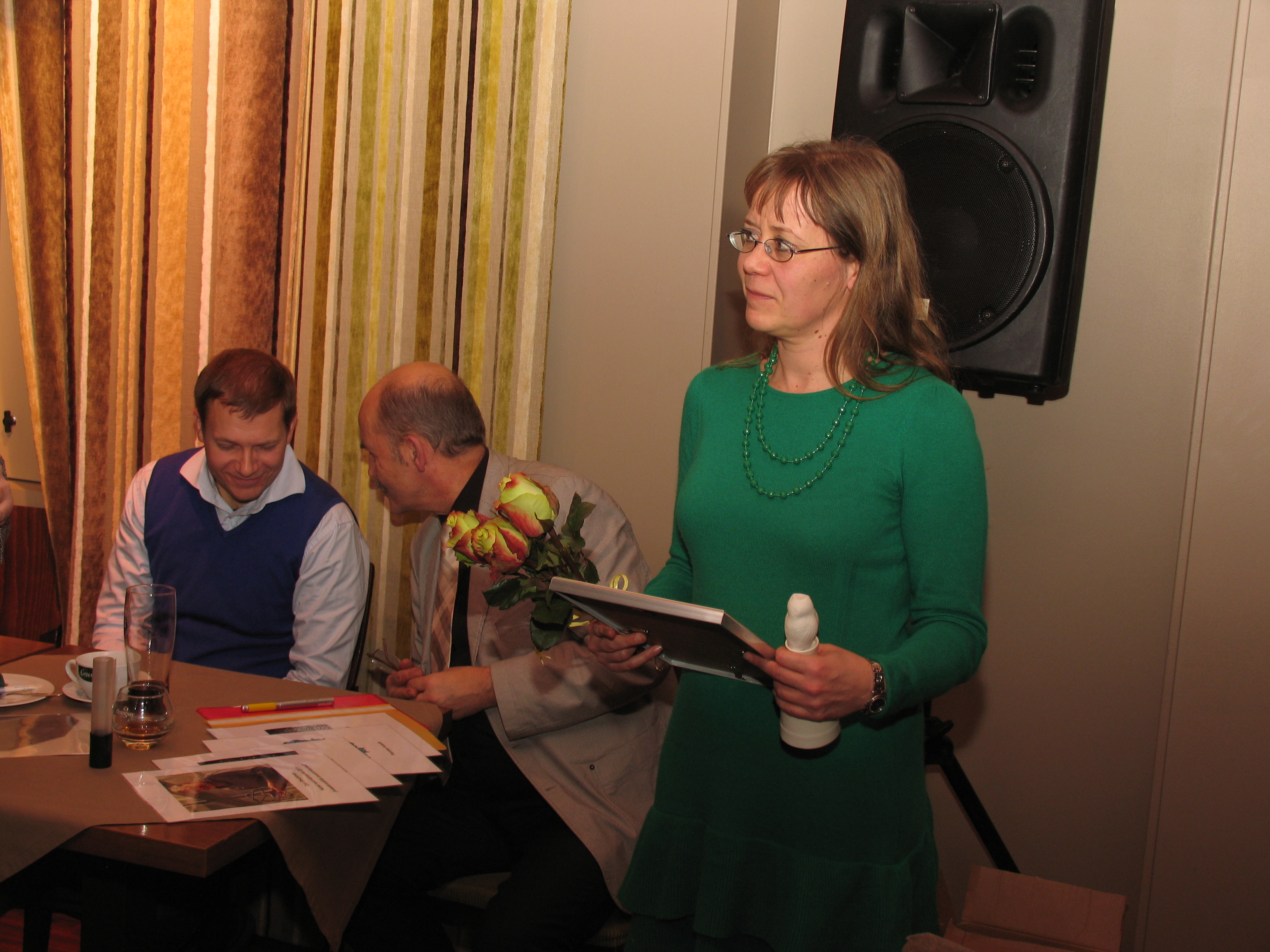 Vulkanoloog Heidi Soosalu võtmas vastu teadusajakirjanduse sõbra auhinda.